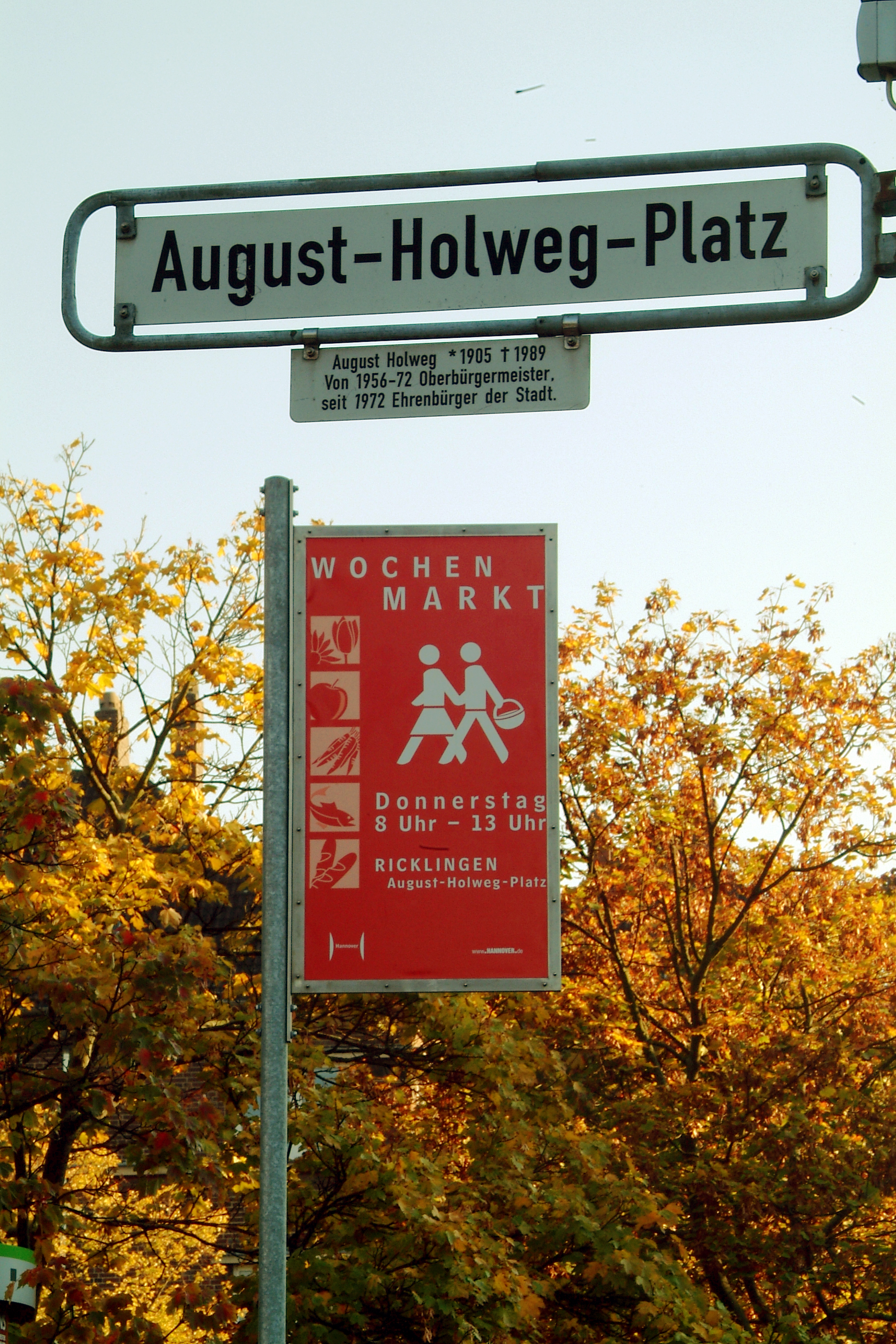 Straßenschild August-Holweg-Platz mit einer gesondert angebrachten Informations-Tafel mit Erläuterungen zu August Holweg; dahinter ein Hinweisschild mit den Angaben zu dem regelmäßig stattfindenden Wochenmarkt.